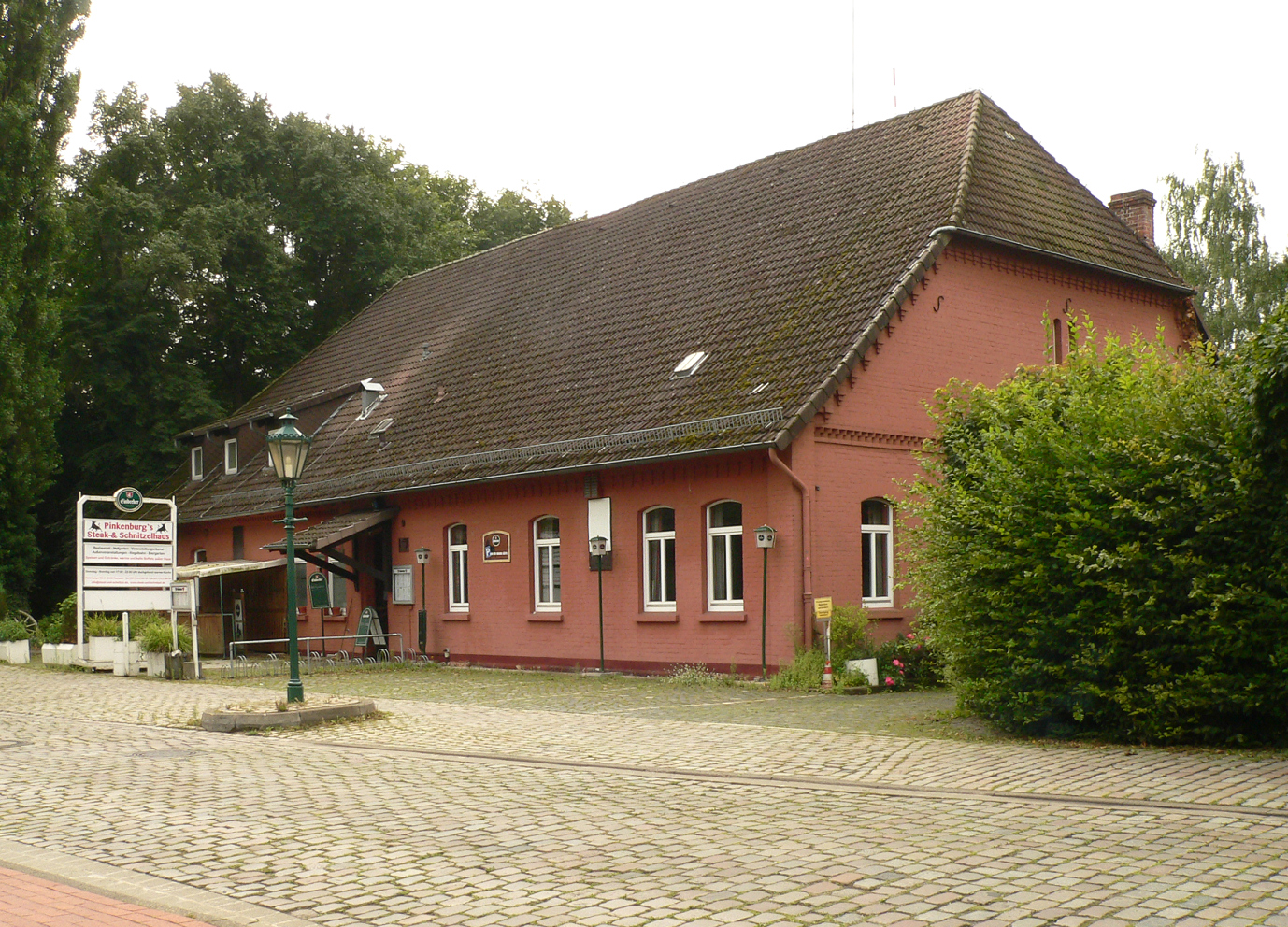 Pinkenburg